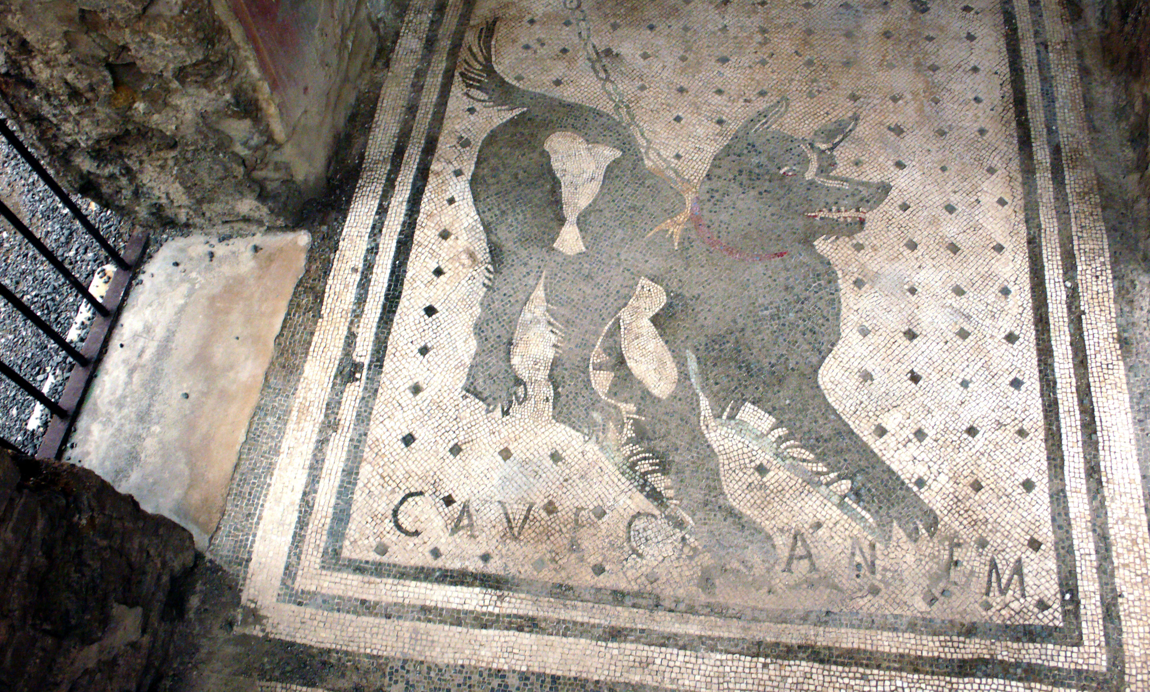 Pompei, Italien: Fußbodenmosaik mit dem Hinweis Cave Canem (Warnung vor dem Hunde). Ergraben im sogenannten Haus des tragischen Poeten (Domus del Poeta Tragico). Beleg: CIL X 877.